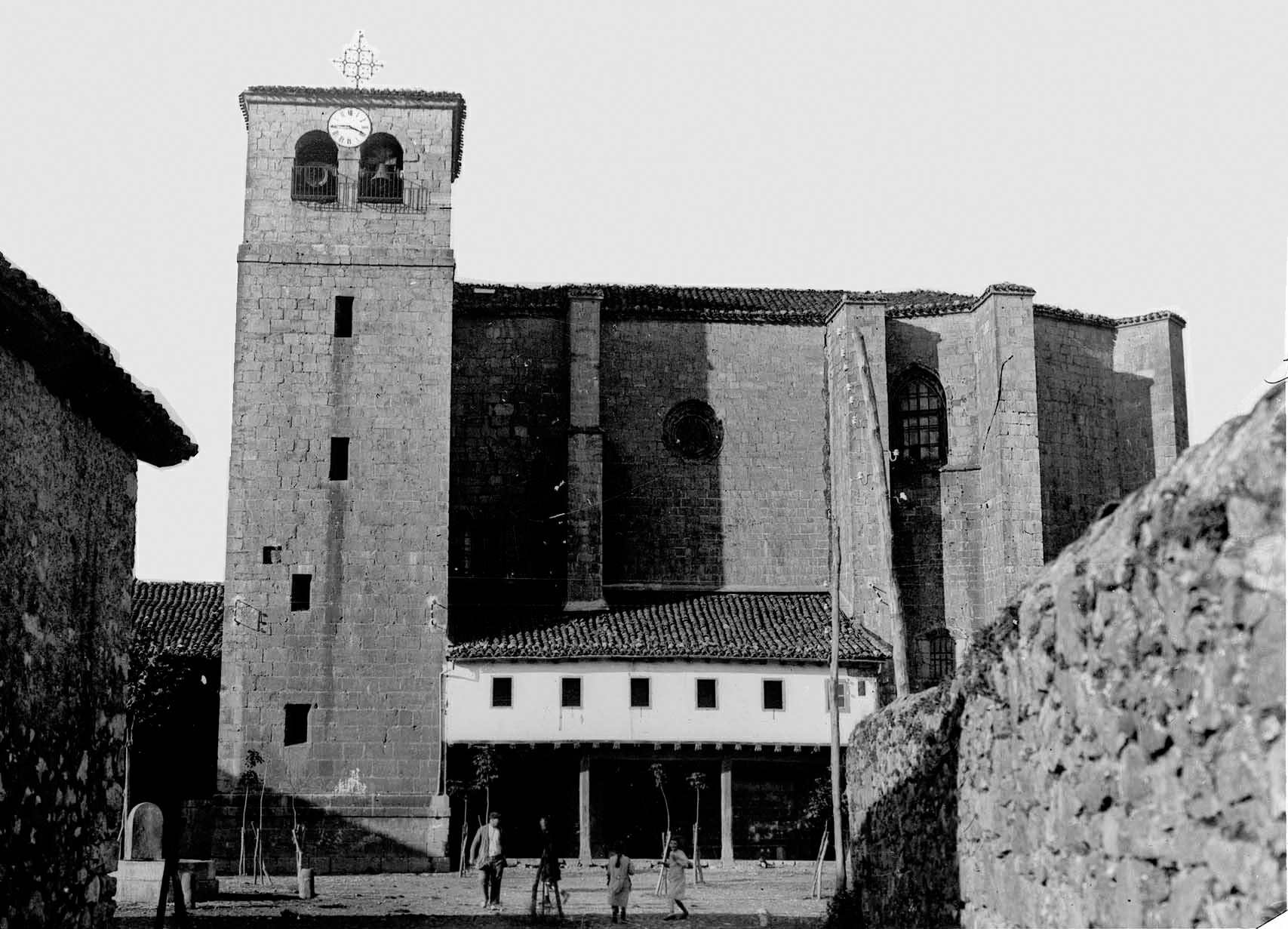 Donemiliaga elizaren ikuspegia, 1914 inguruan